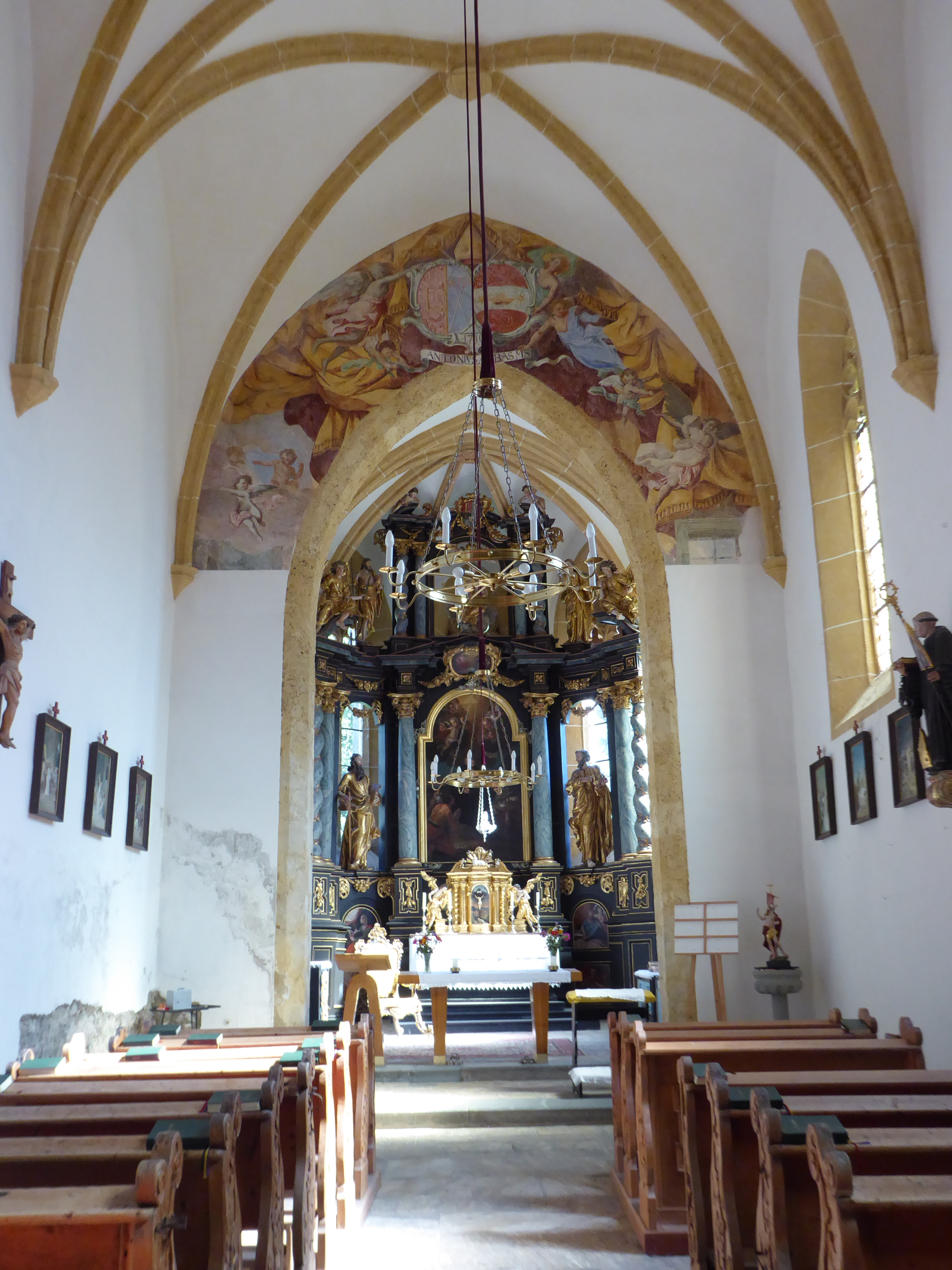 Filialkirche St. Leonhard, Seewiesen, Turnau, Steiermark, Österreich